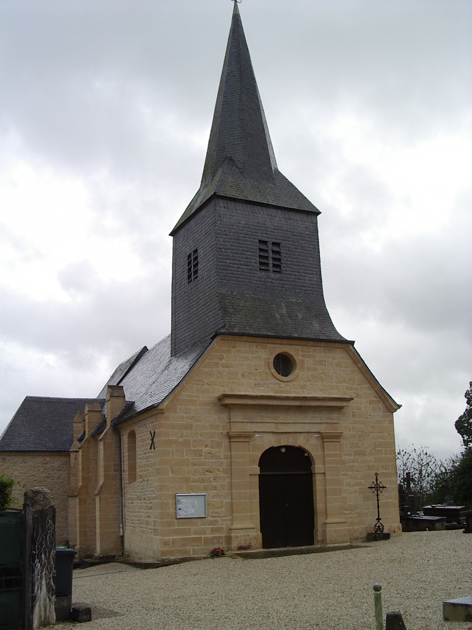 Eglise des Ayvelles, departement des Ardennes, France